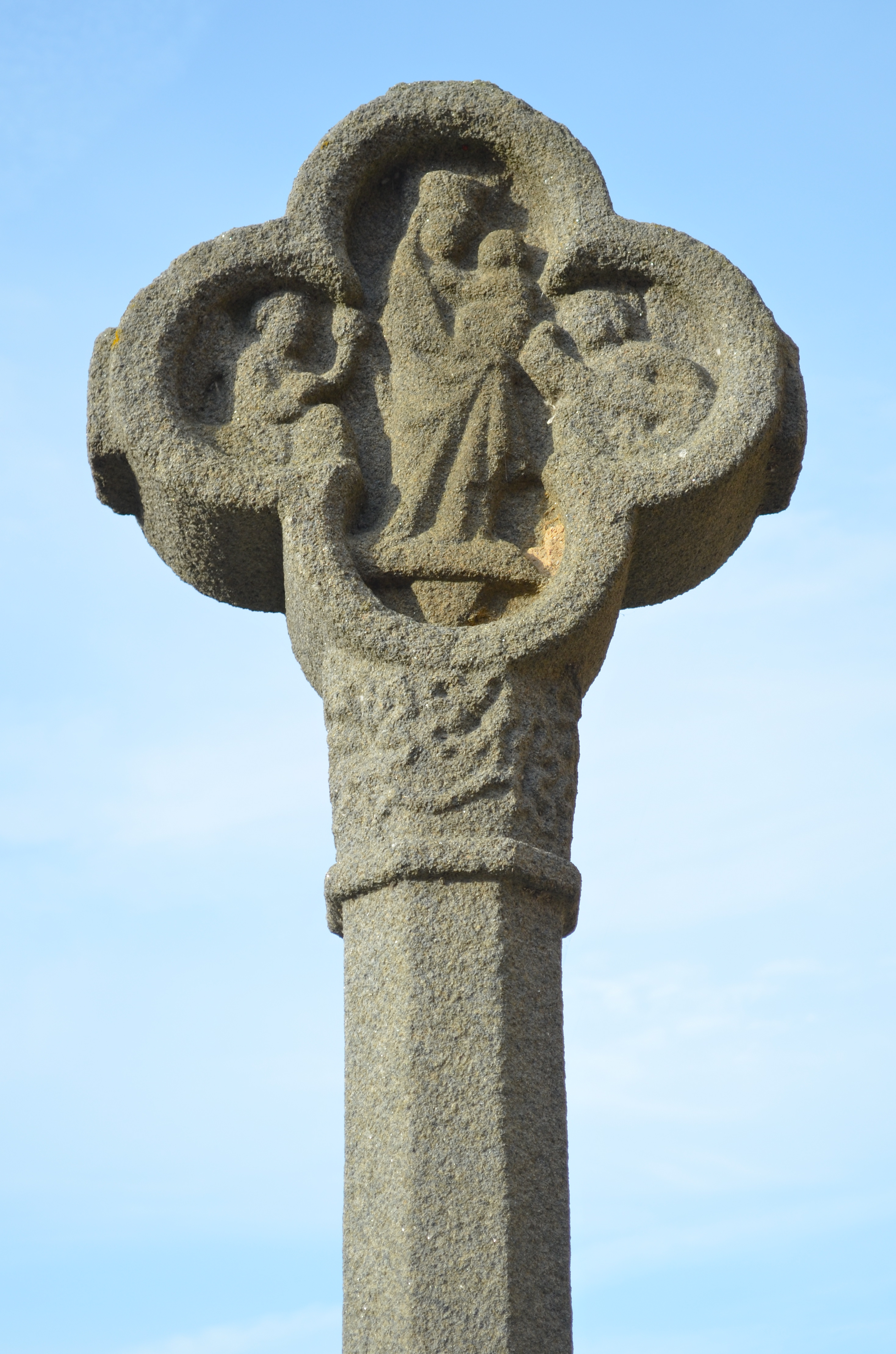 Croix du 15e siècle - Grand-Fougeray (Ille-et-Vilaine)